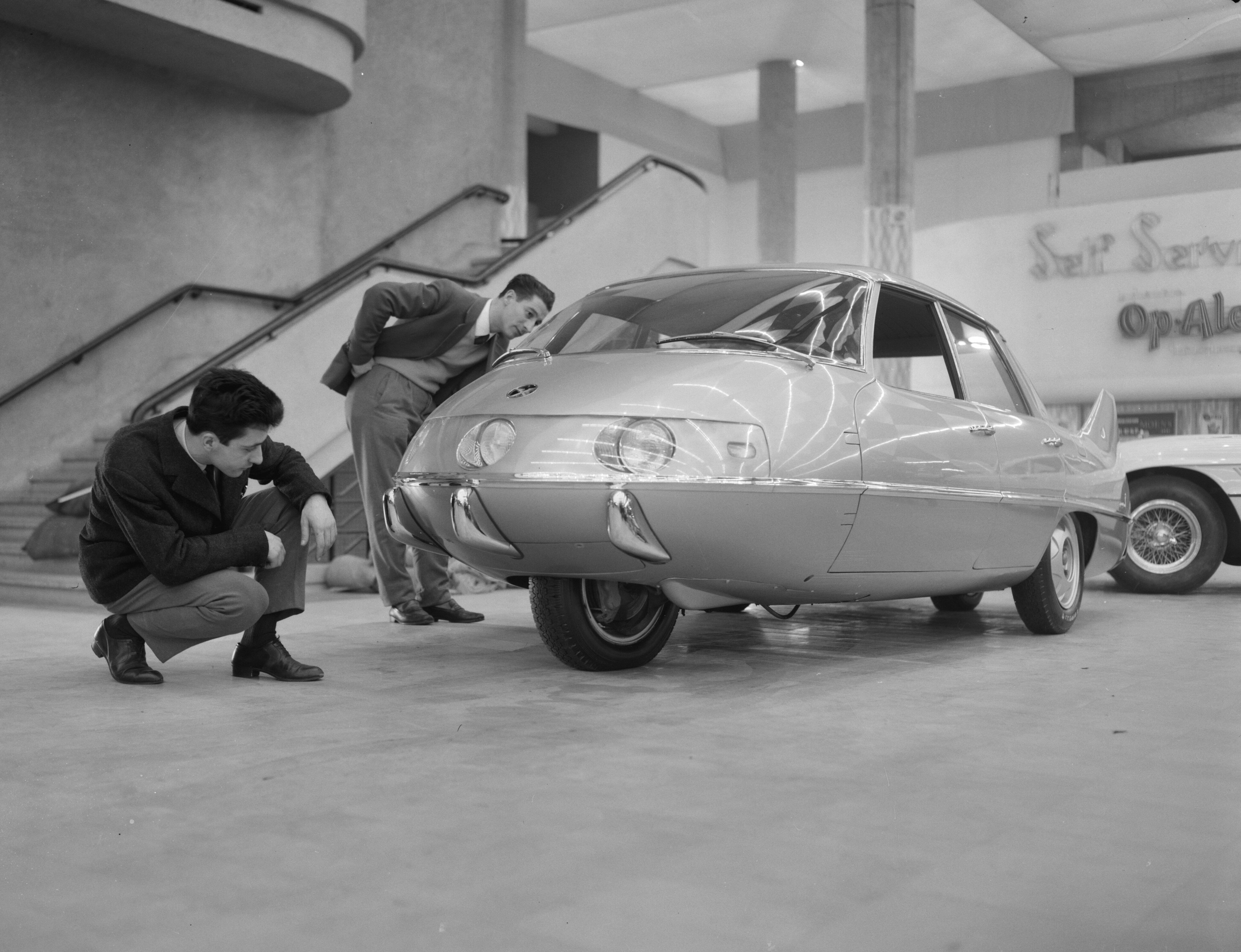 Collectie / Archief : Fotocollectie Anefo Reportage / Serie : [ onbekend ] Beschrijving : 41e automobieltentoonstelling in Brussel, nieuw Italiaans ontwerp "Pinin Farini" Datum : 17 januari 1961 Locatie : Brussel Trefwoorden : automobieltentoonstellingen, ontwerpen Fotograaf : Bilsen, Joop van / Anefo Auteursrechthebbende : Nationaal Archief Materiaalsoort : Negatief (zwart/wit) Nummer archiefinventaris : bekijk toegang 2.24.01.04 Bestanddeelnummer : 911-9851